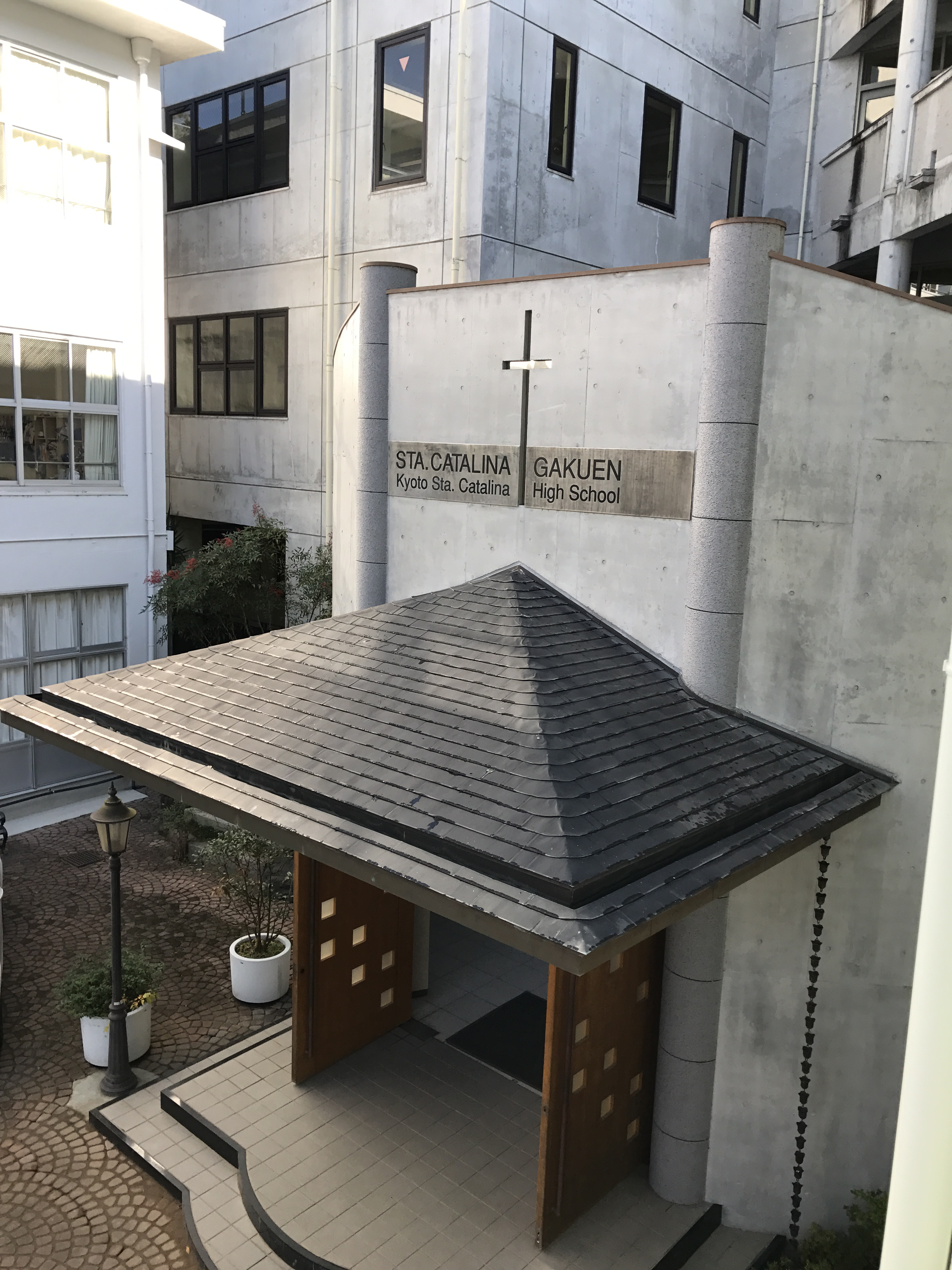 玄関の写真です。